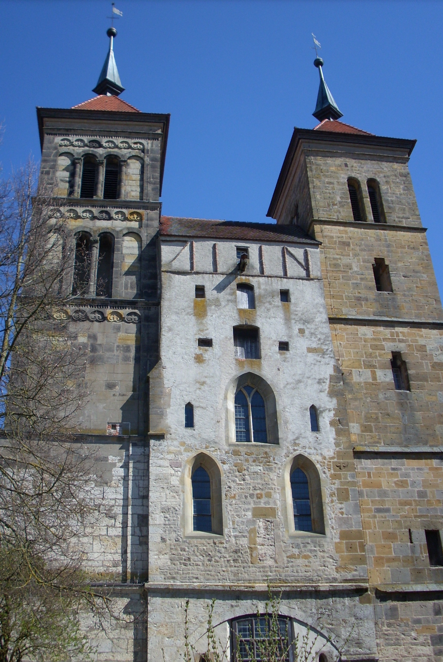 Ehemalige Benediktinerabtei Auhausen bei Oettingen: Blick auf die ehemalige Westfront - durch Geschichte geschundener Bau!This is a photograph of an architectural monument.